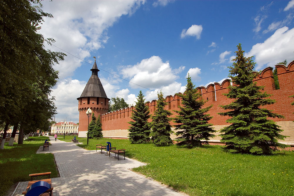 Кремлевские стены и летний сад рядом с ним